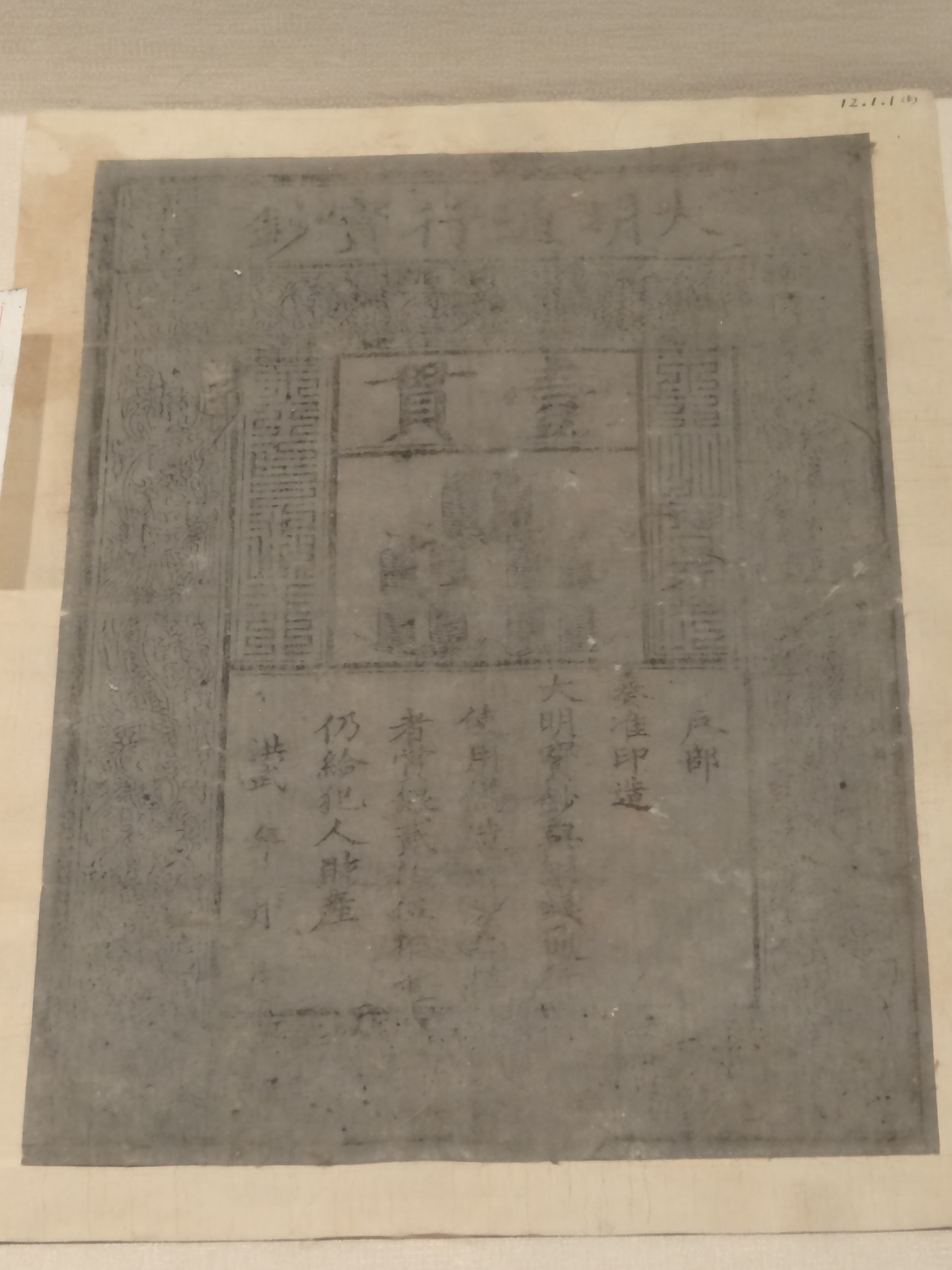 大明通行宝钞，拍摄于山东博物馆